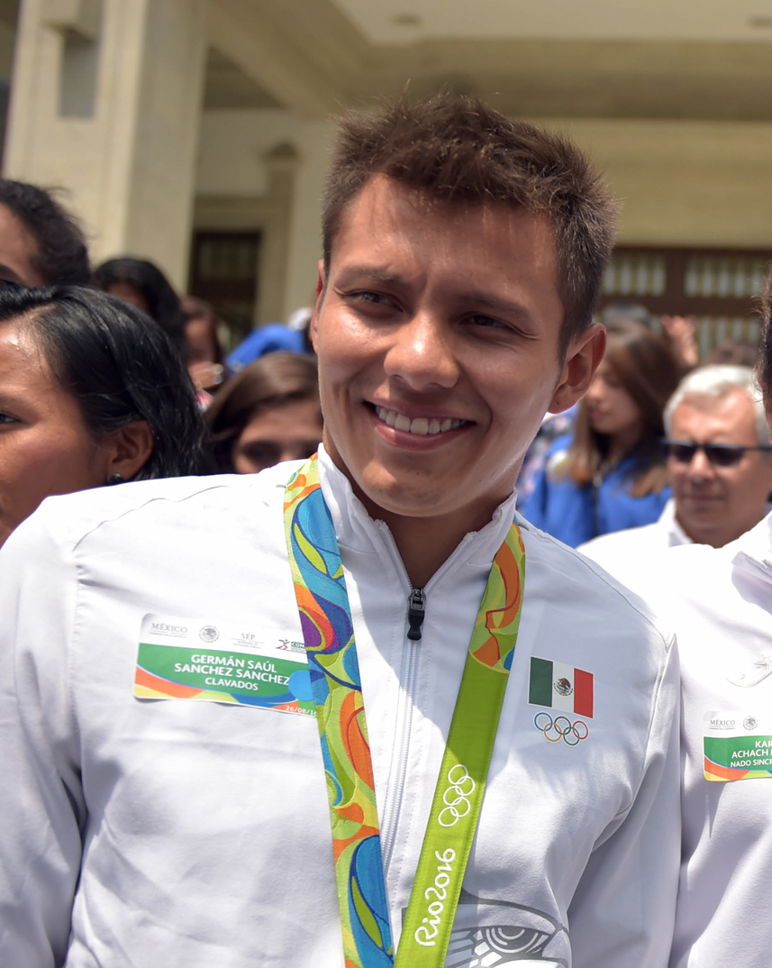 El Presidente Enrique Peña Nieto se reunió hoy con los deportistas que integraron la delegación mexicana que participó en los Juegos Olímpicos de Río de Janeiro 2016, a quienes les expresó su reconocimiento por el esfuerzo, la entrega, el empeño y el coraje que demostraron en esta justa olímpica y durante el proceso para llegar a ella.